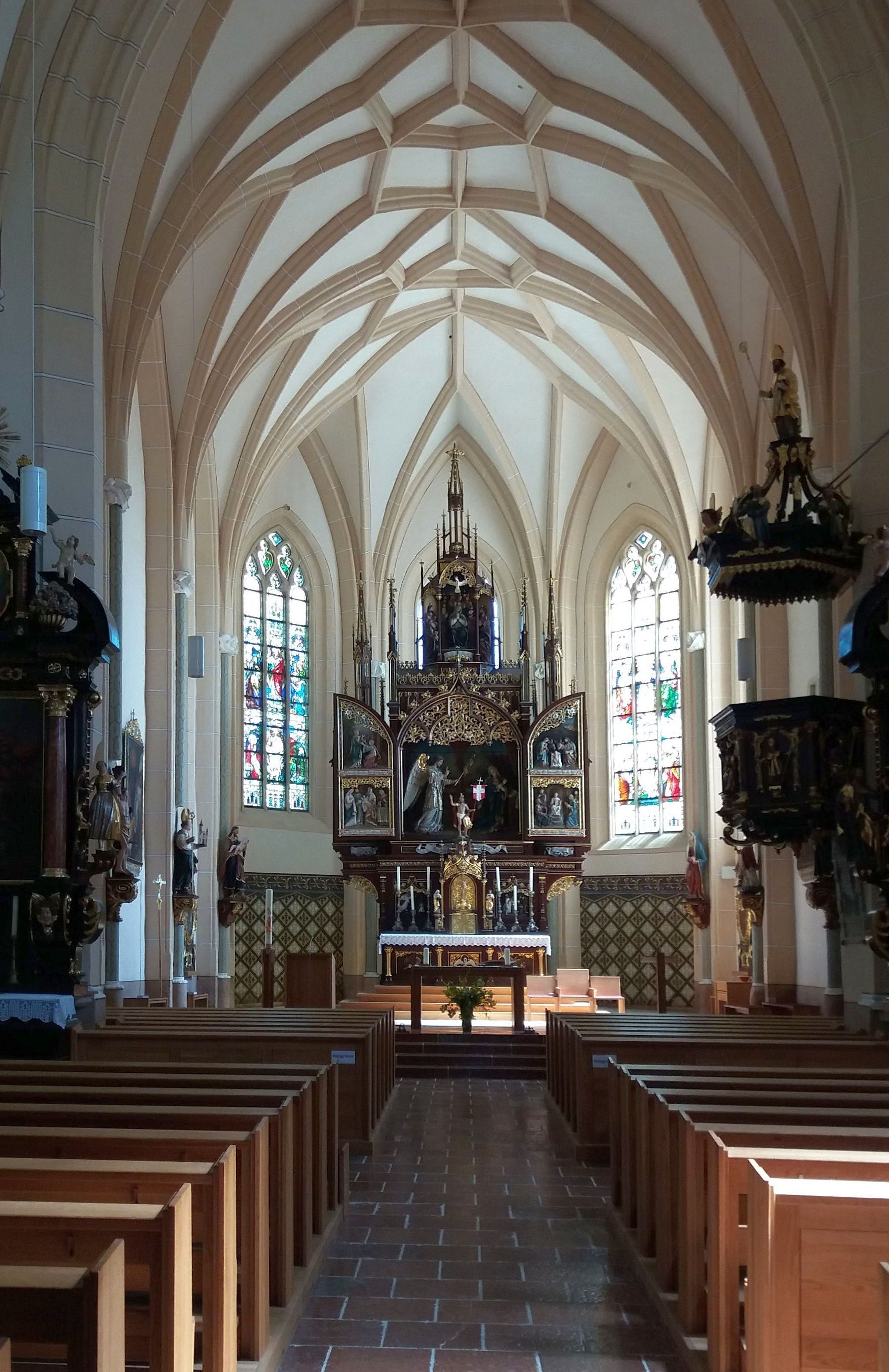 Pfarrkirche Taufkirchen an der Pram - Inneres, Blick Richtung Osten